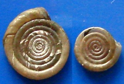 Anisus septemgyratus (Roßmäßler, 1835), Planorbidae, Basommatophora, Gastropoda